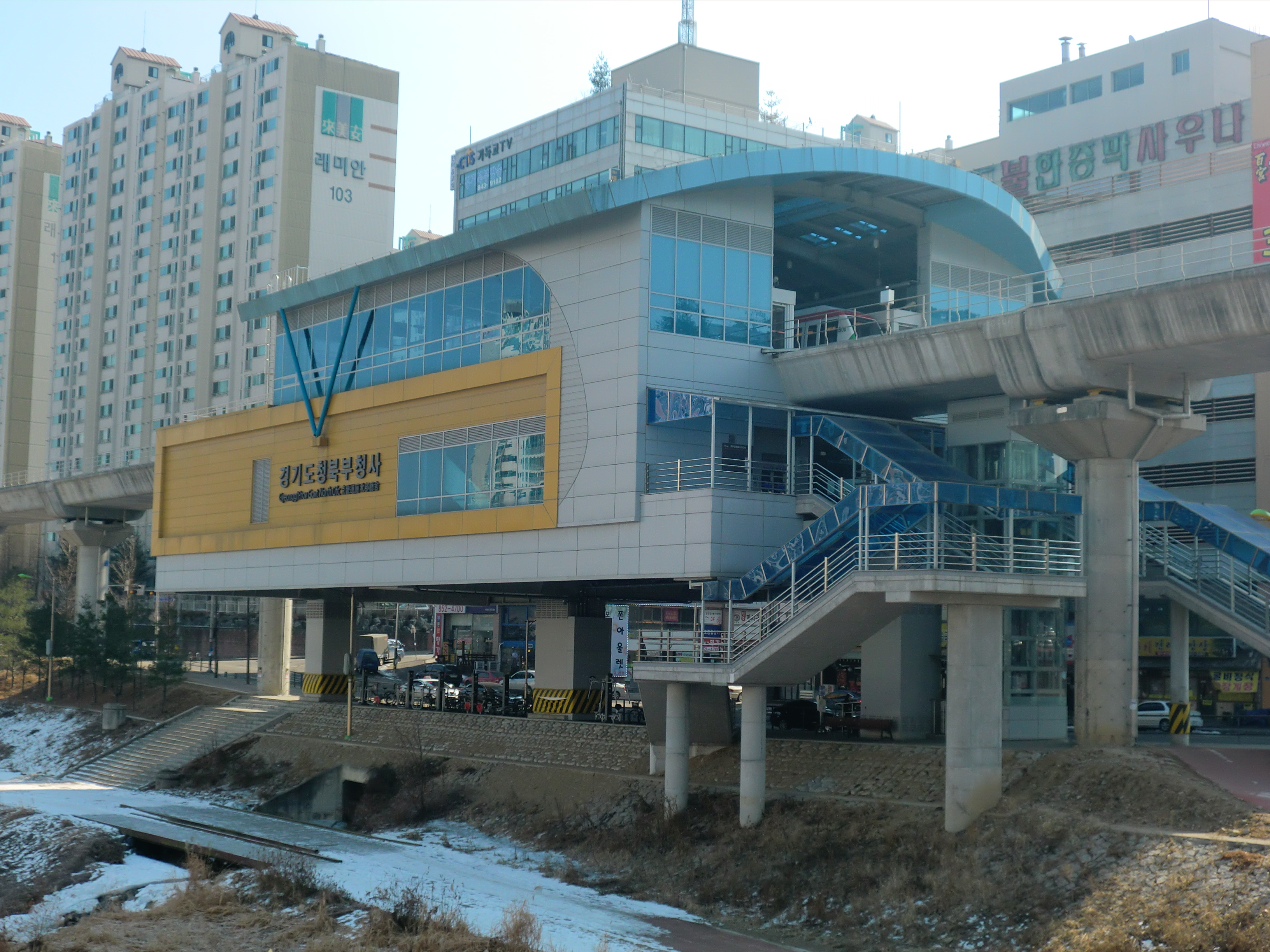 경기도 의정부시에 있는 경기도북부청사역